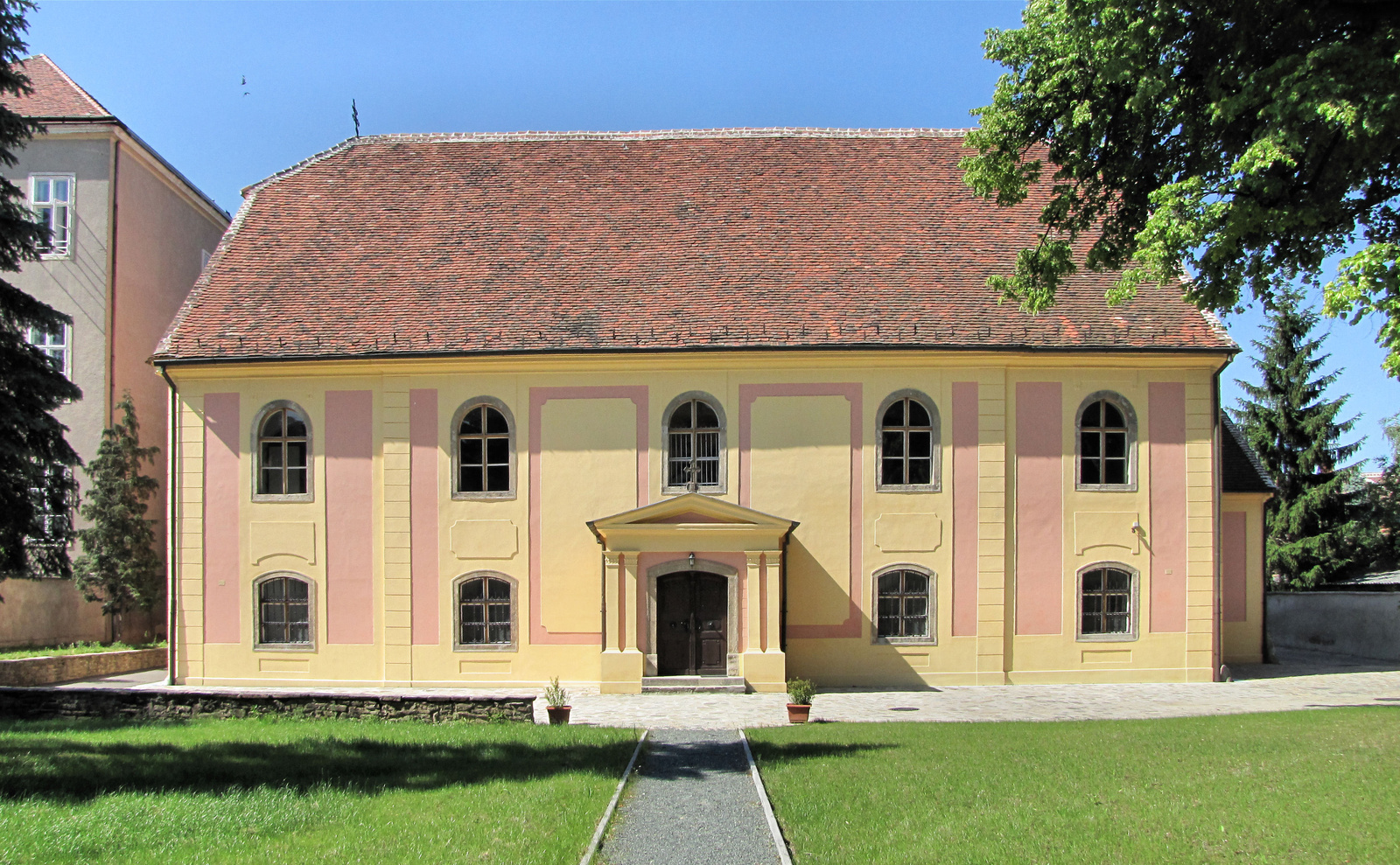 Ev. konventház (Kőszeg, Gyöngyös u. 29 .) This is a photo of a monument in Hungary. Identifier: 9066